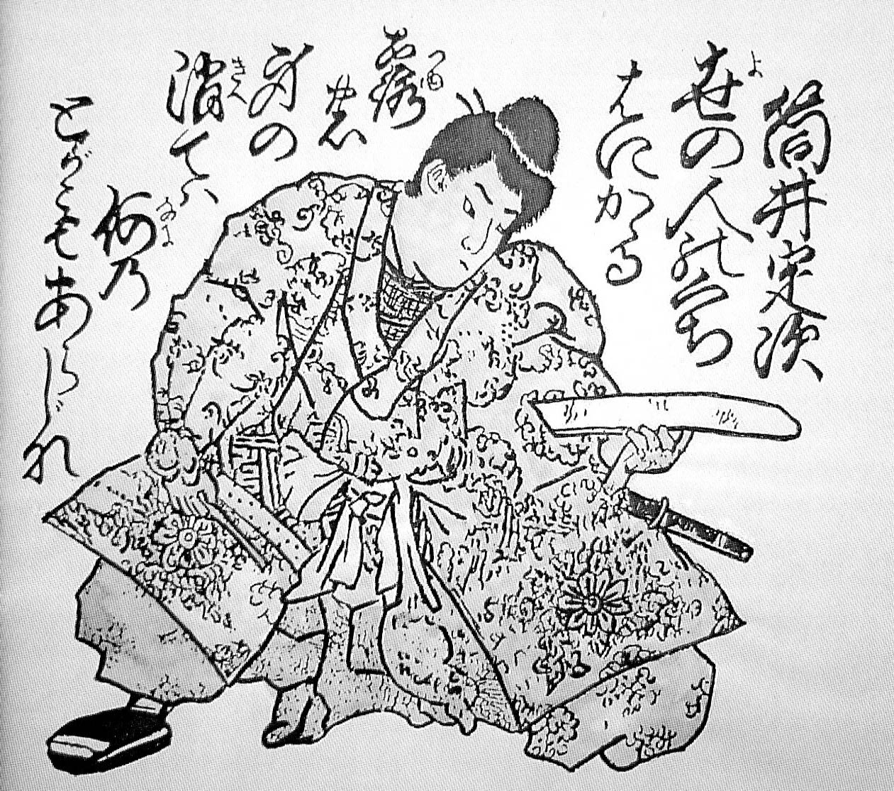 筒井定次画像